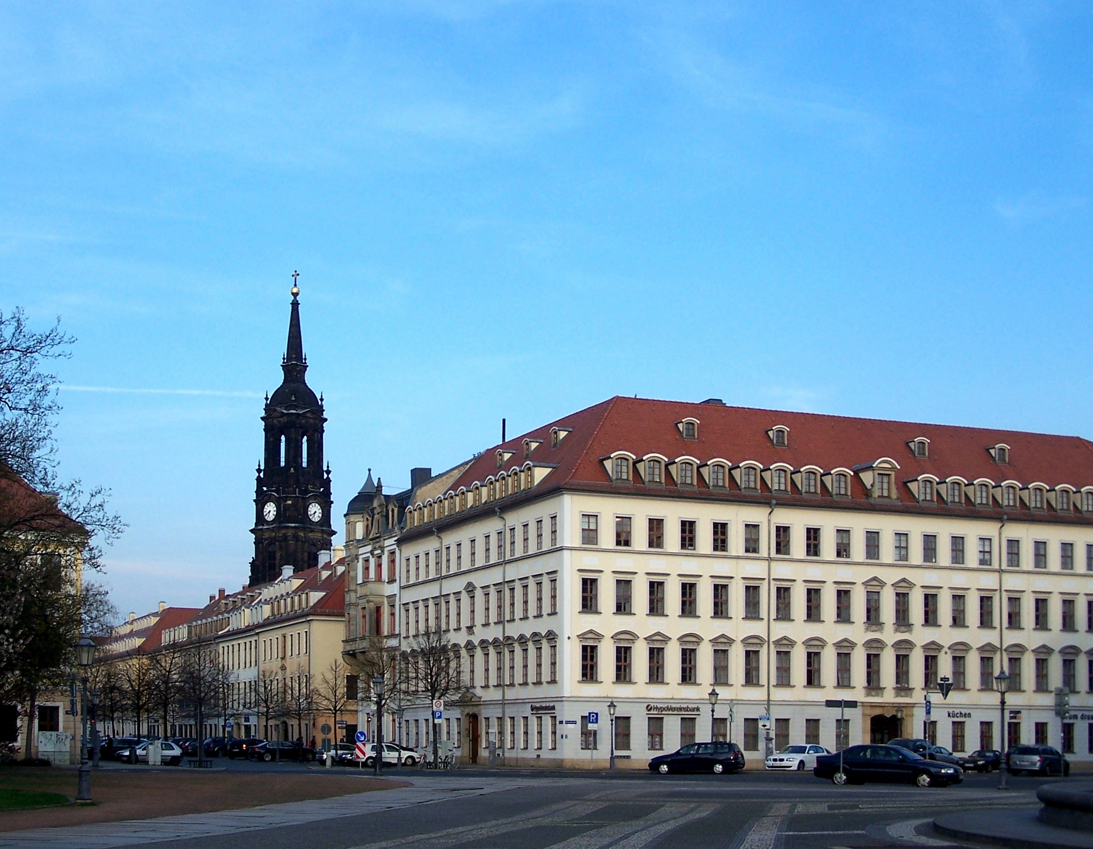 Blick vom Palaisplatz in die Königstraße, im Hintergrund der Turm der Dreikönigskirche; Innere Neustadt, Dresden